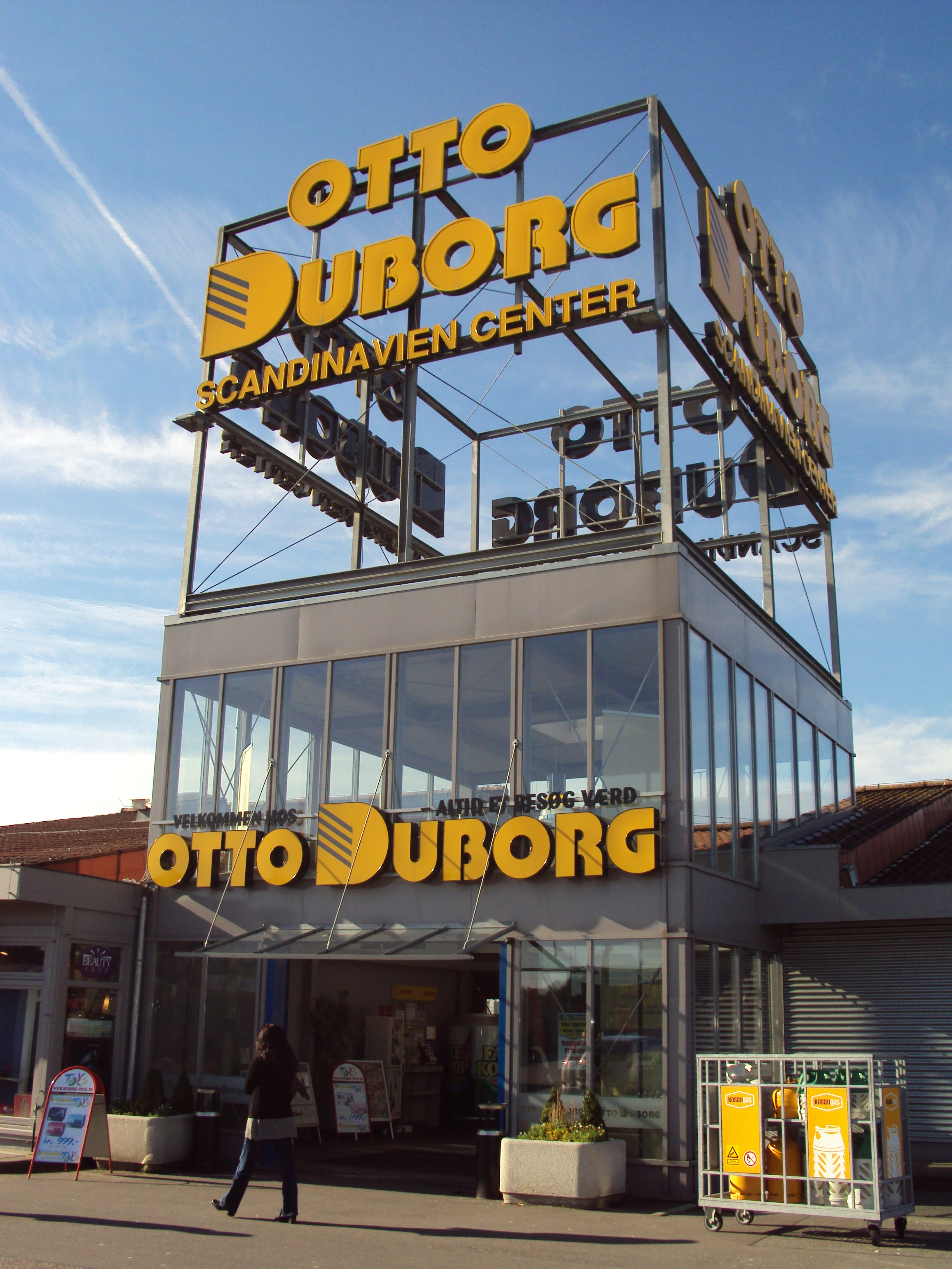 Otto Duborg grænsebutik i Harreslev.